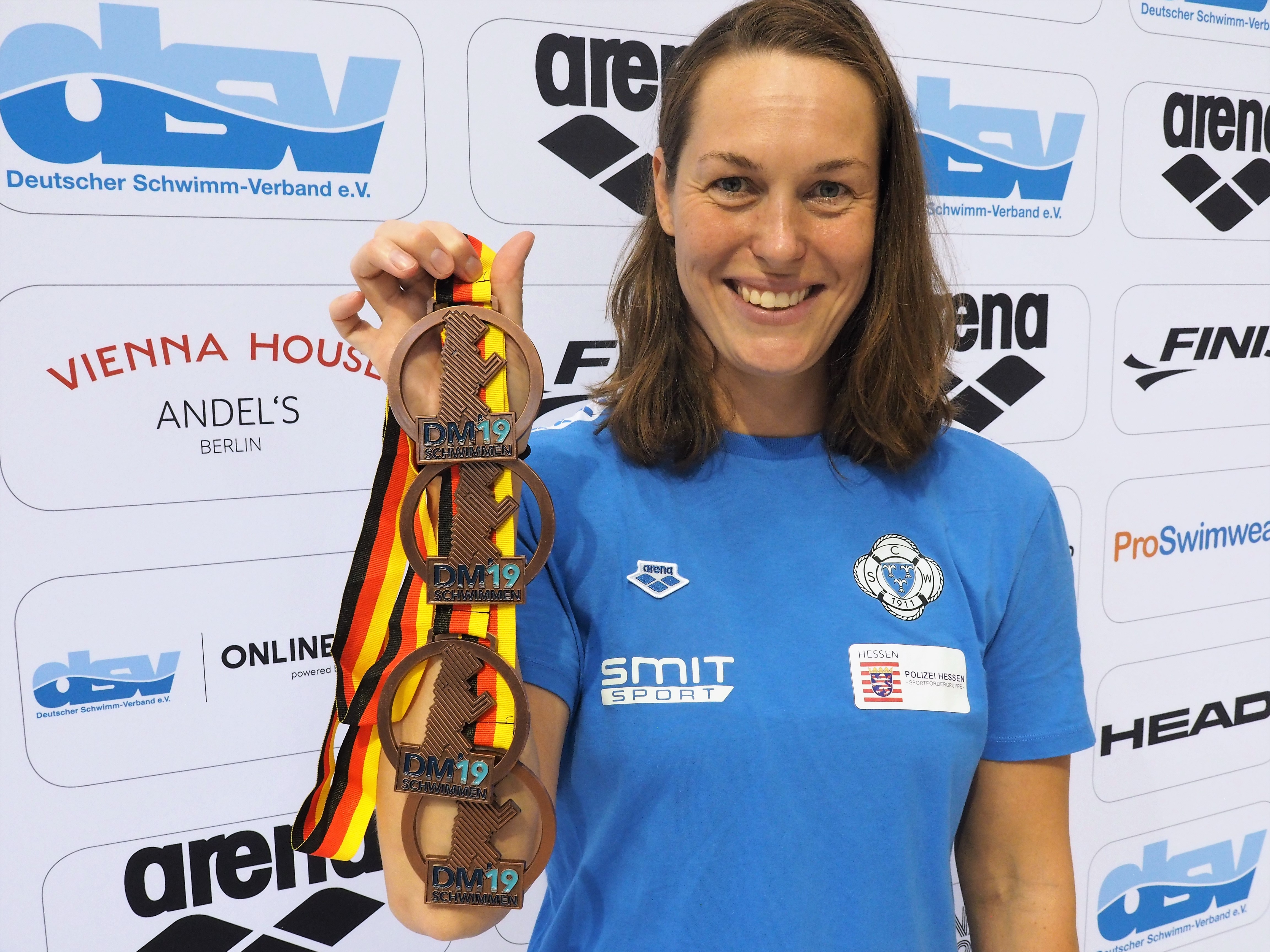 4x Bronze für Jenny Mensing bei der Langbahn DM 2019